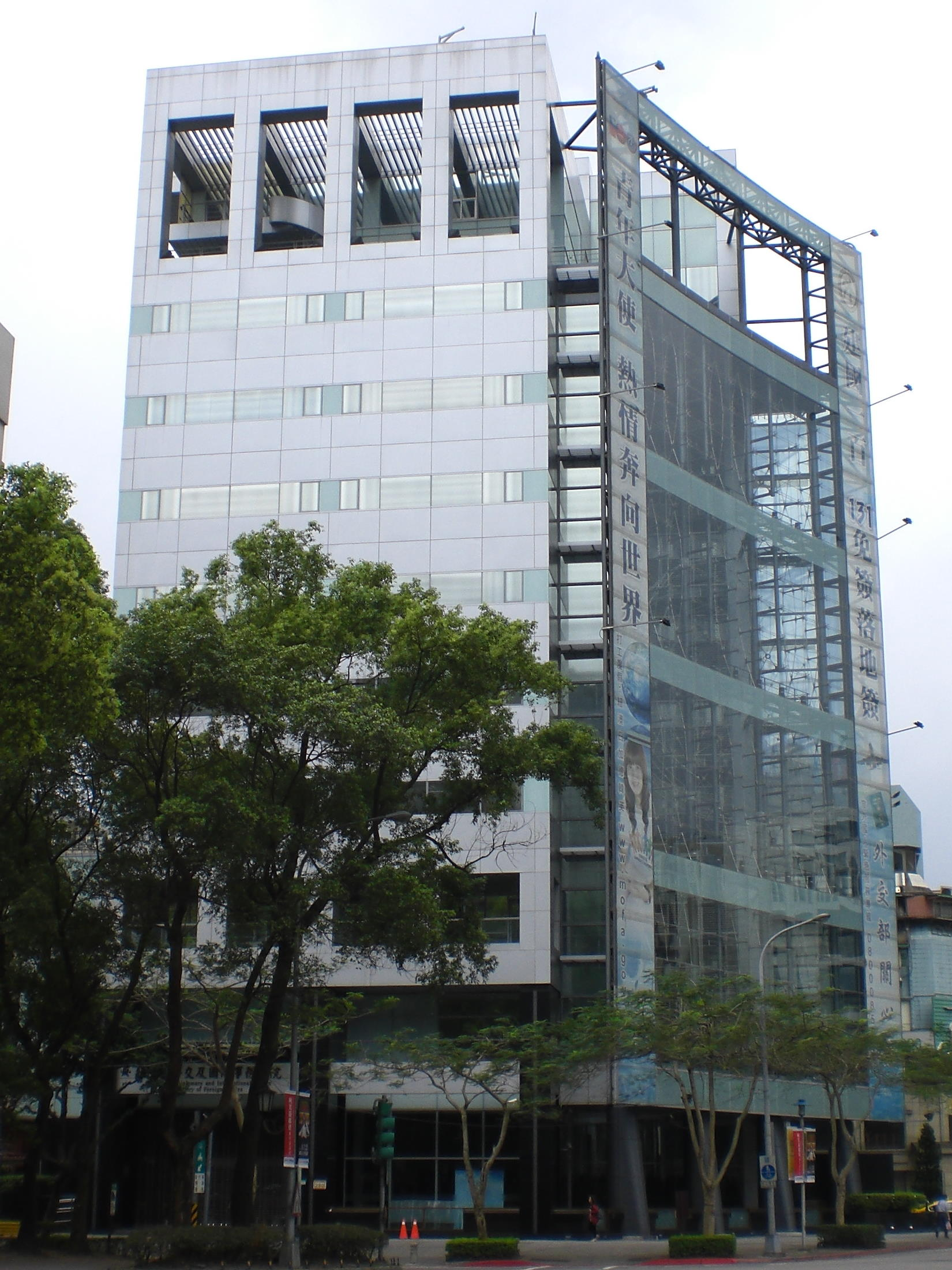 中文（台灣）: 中華民國外交部外交及國際事務學院大樓，外牆張貼慶祝中華民國建國一百週年廣告。